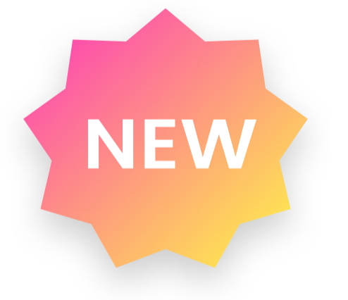 Logo de entrada en la lista de Billboard